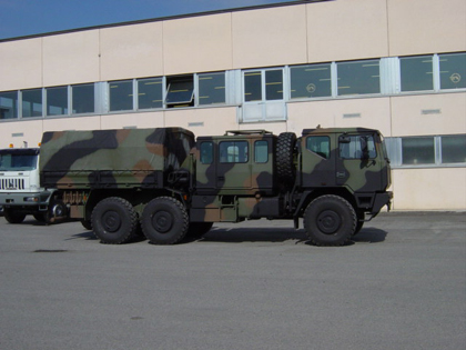 autocarro astra, esercito italiano